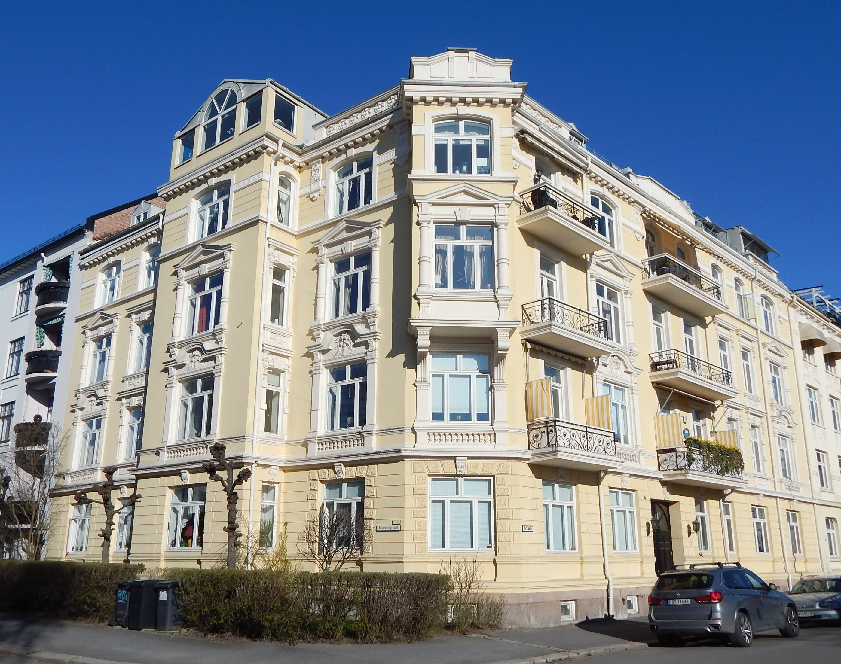 Tors gate 5. Arkitekt: Ludwig Zapffe (1901).